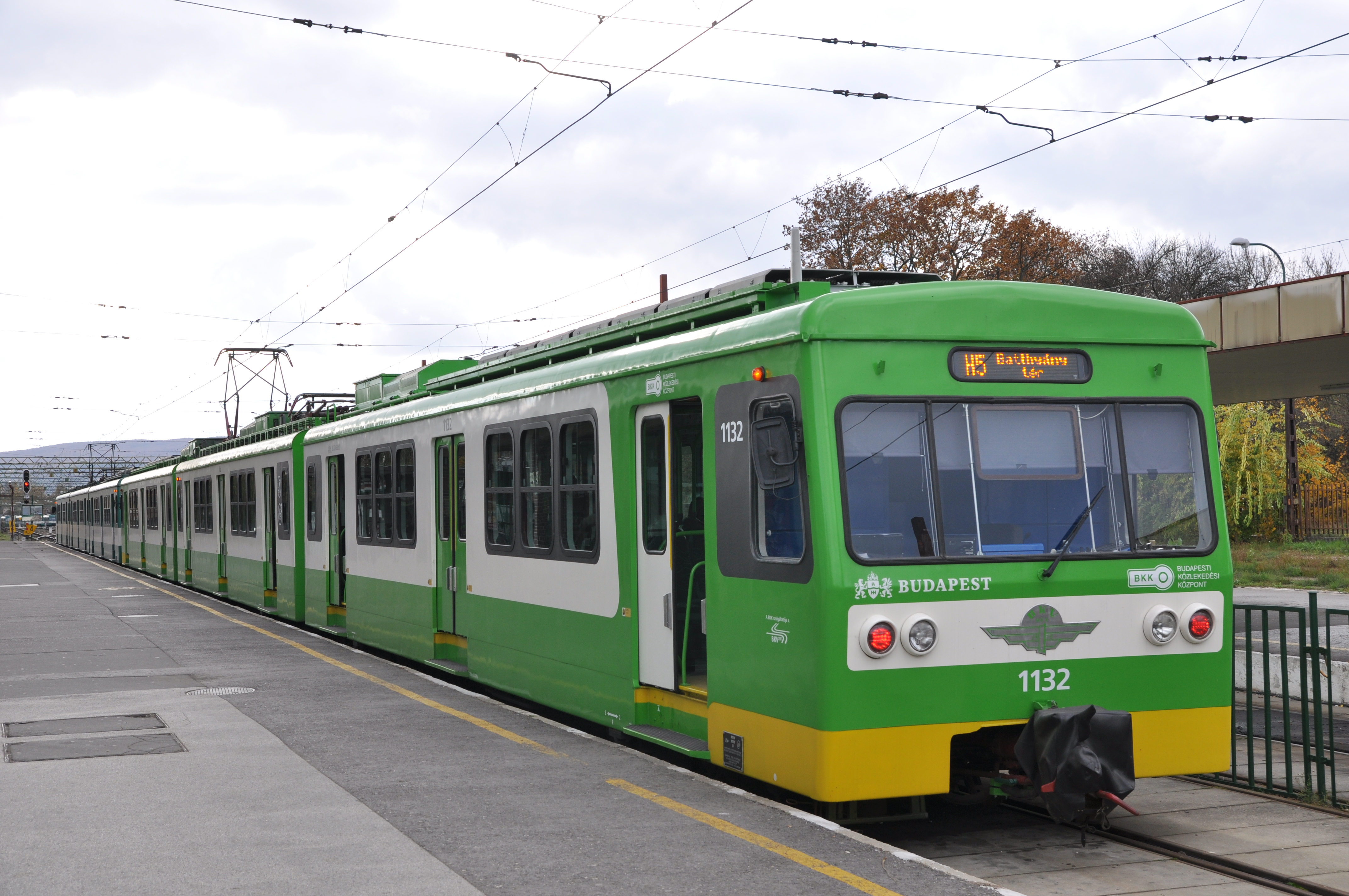 Szentendre, HÉV állomás